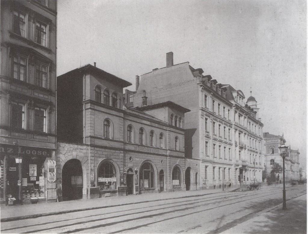 Leipzig: Die Hospitalstraße (heute Prager Straße), um 1910. Ganz rechts sieht man das Paket- und Zeitungspostamt, Prager Str. 4-10